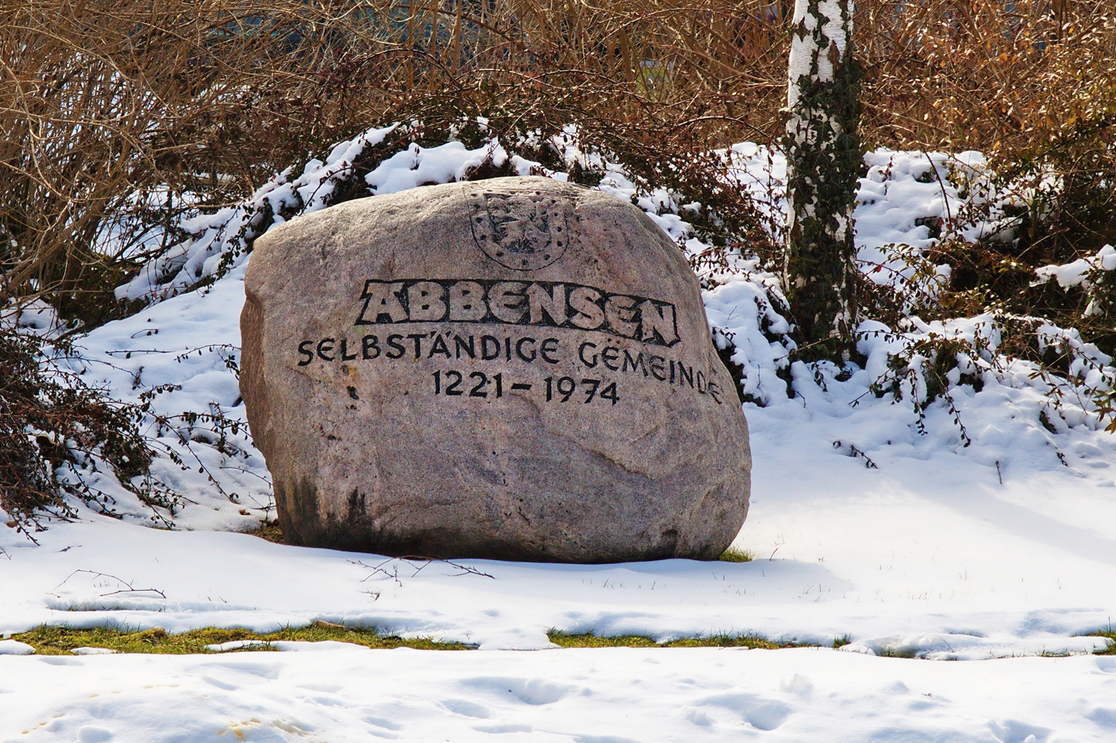 Gedenkstein 1221-1974 der selbständigen Gemeinde Abbensen (Edemissen), Niedersachsen, Deutschland